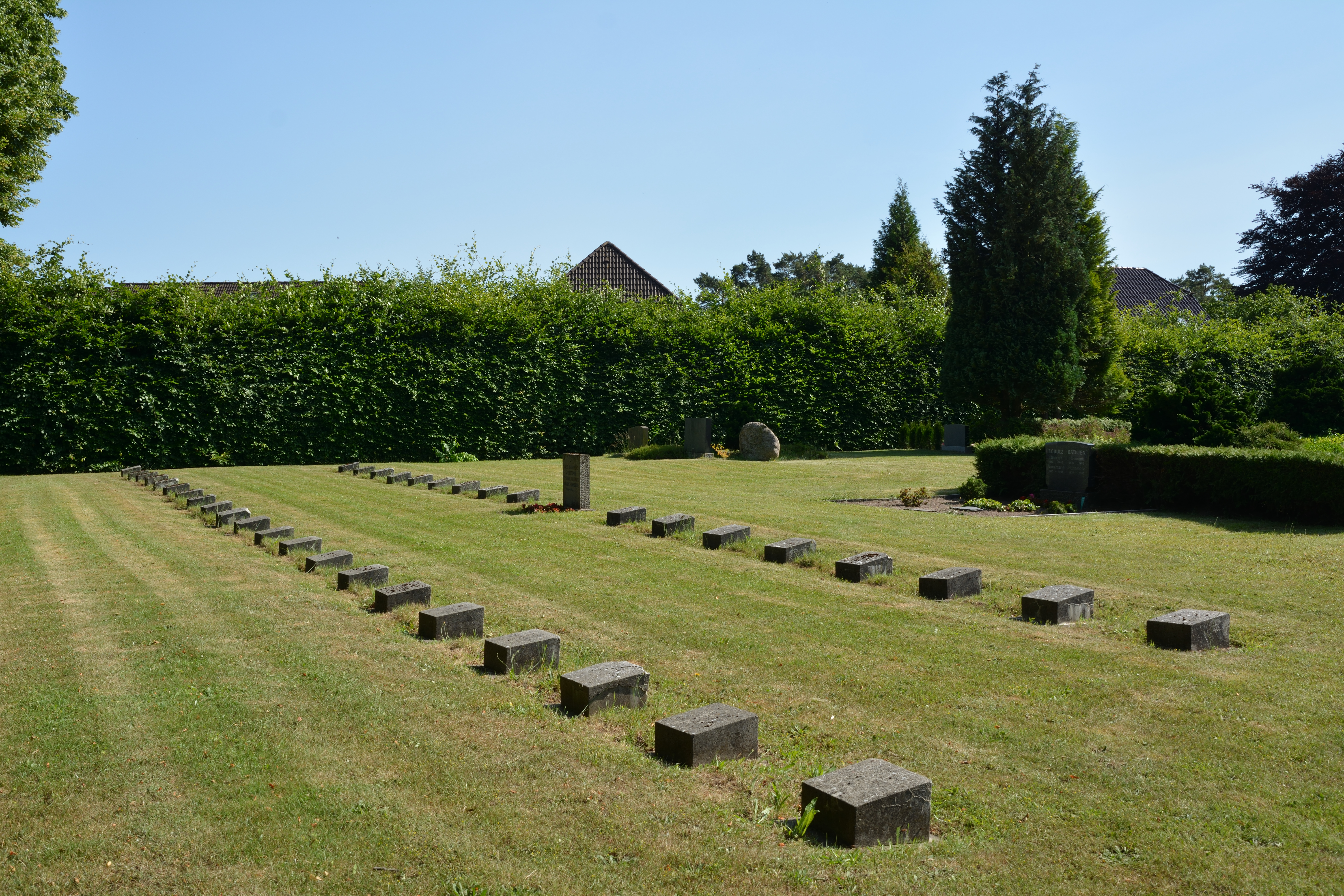 Kriegsgräber auf dem Friedhof von Osterrönfeld